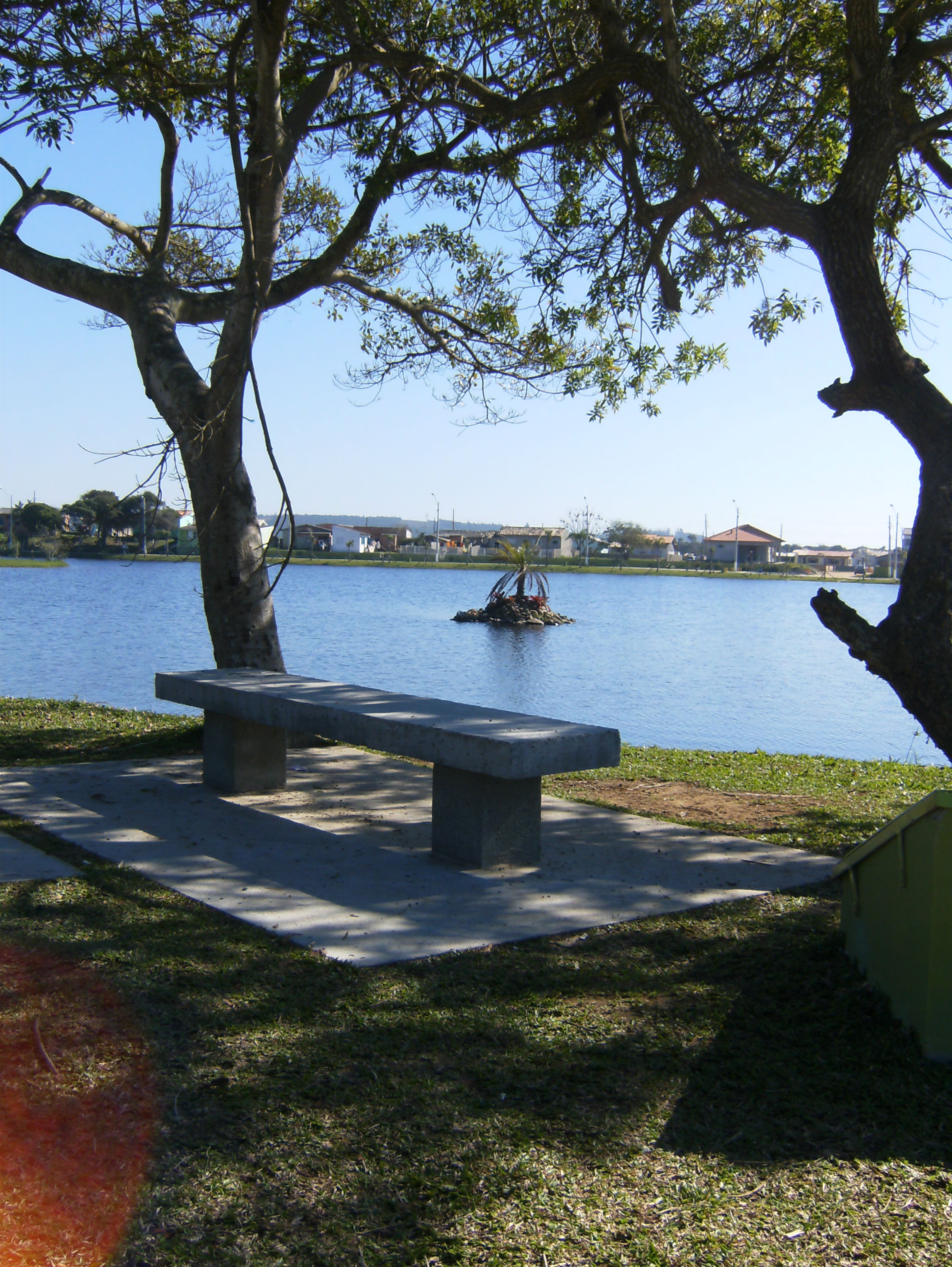 Lagoa do Jacaré, em Balneário Rincão, município de Içara, Santa Catarina, Brasil